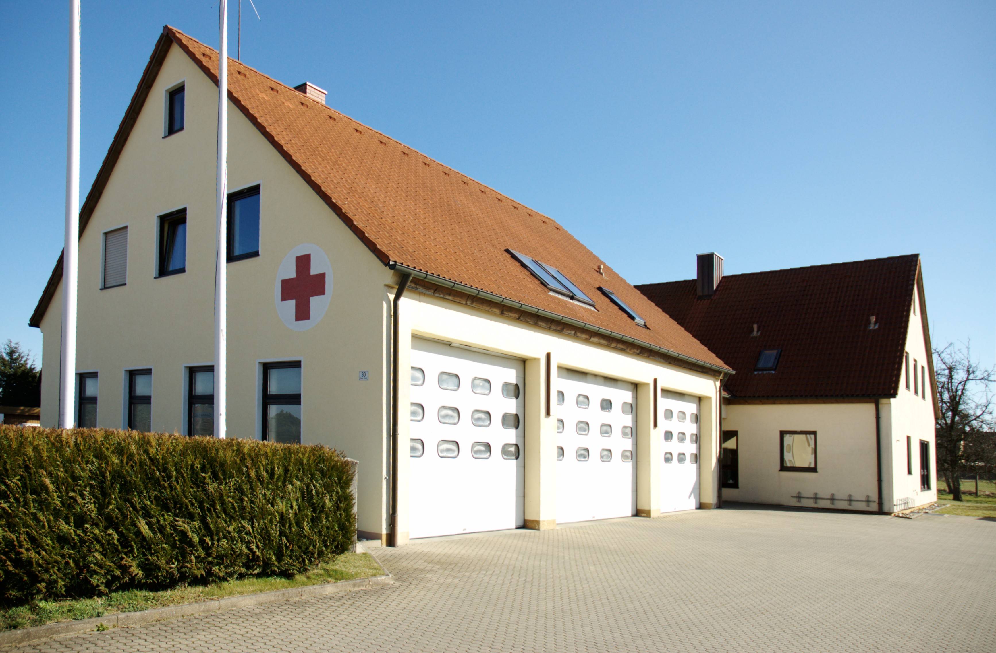 Rotkreuzhaus Neuendettelsau